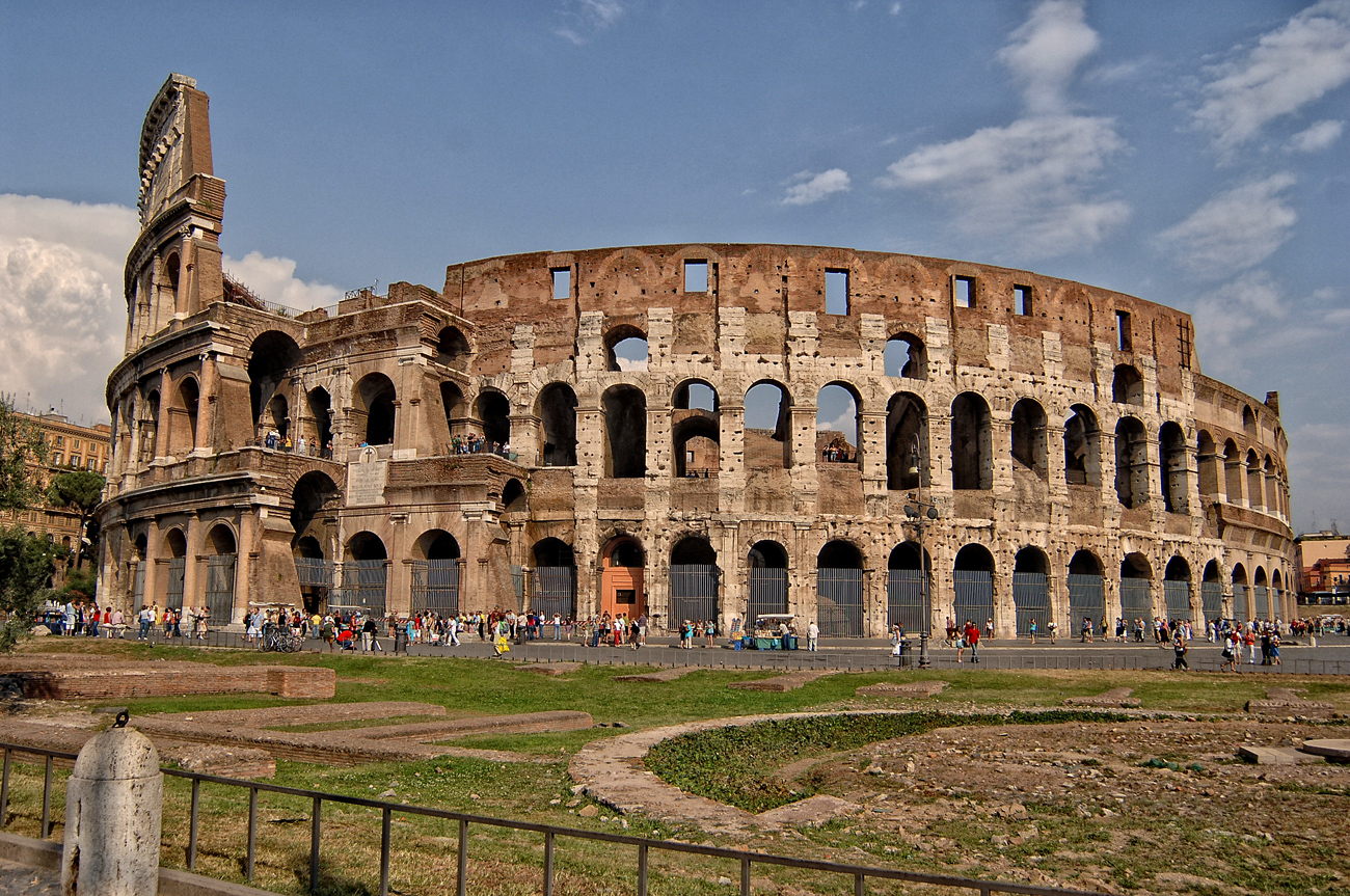 Колизей 2006 год